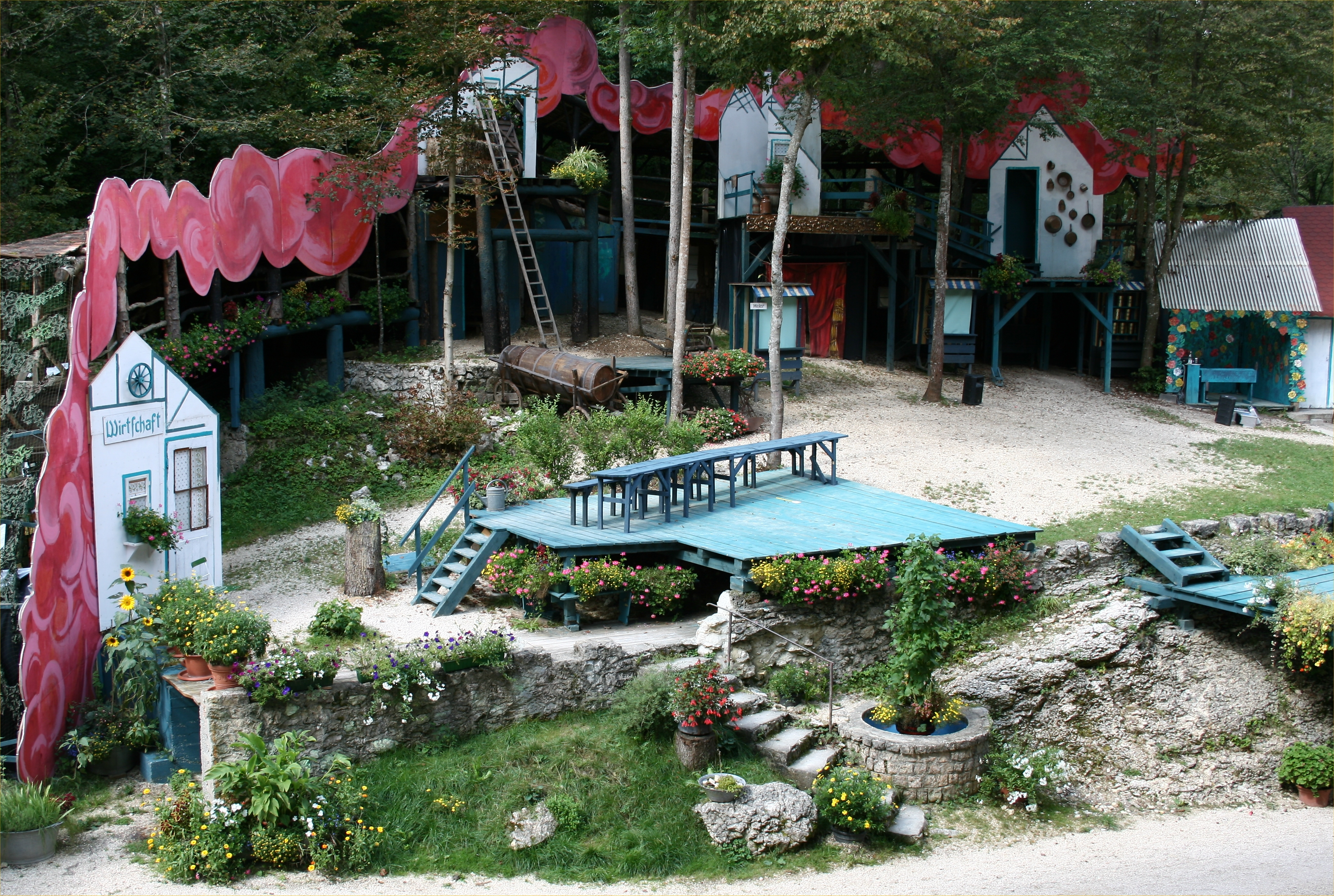 Das Naturtheater Hayingen bietet seit 1949 Volkstheater auf einer reizvollen Bühne mitten im Wald nahe Hayingen auf der Schwäbischen Alb